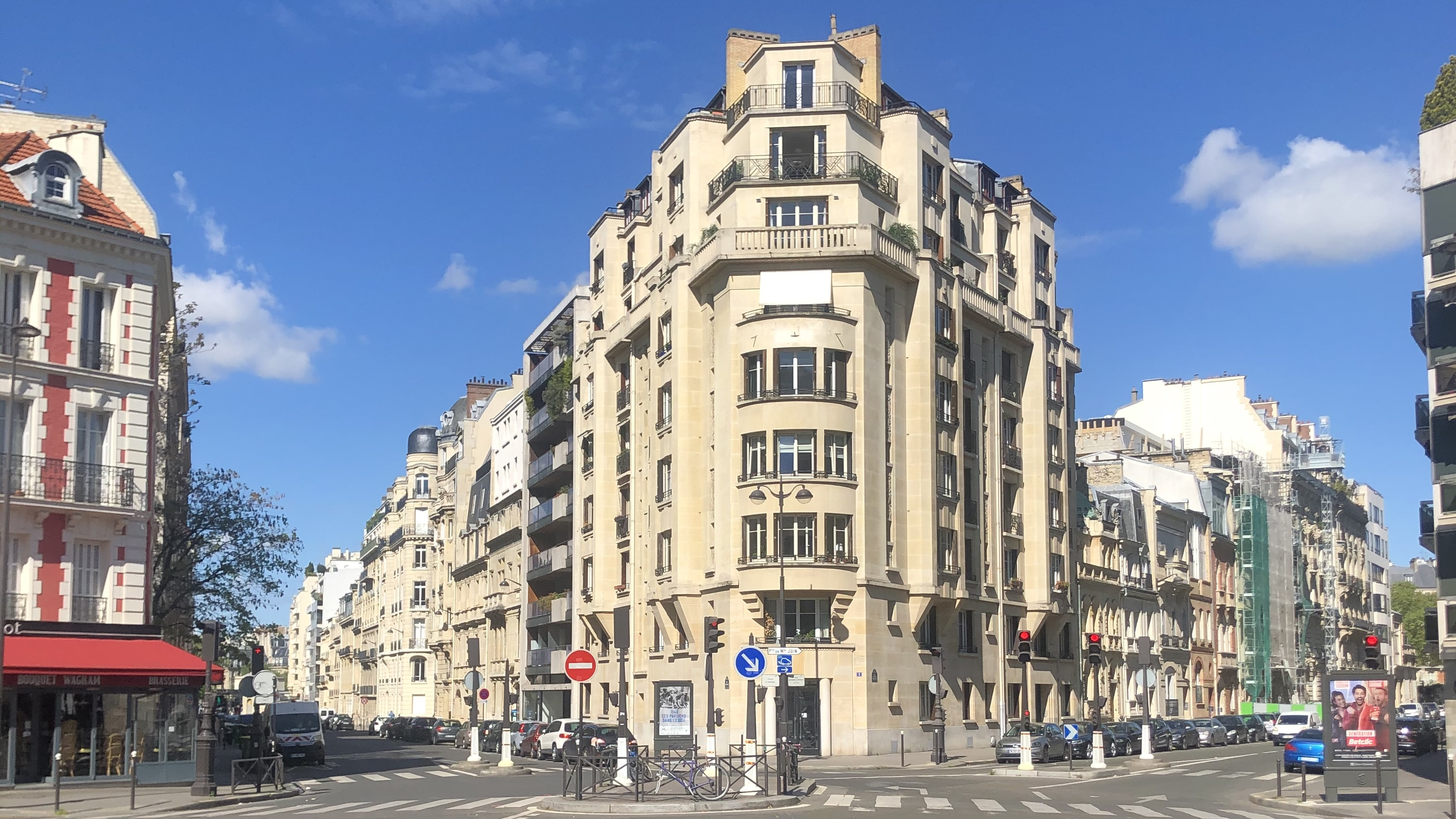 Place d'Israël, Paris 17, Intersection avenue de Wagram, rue Alphonse de Neuville et rue Brémontier